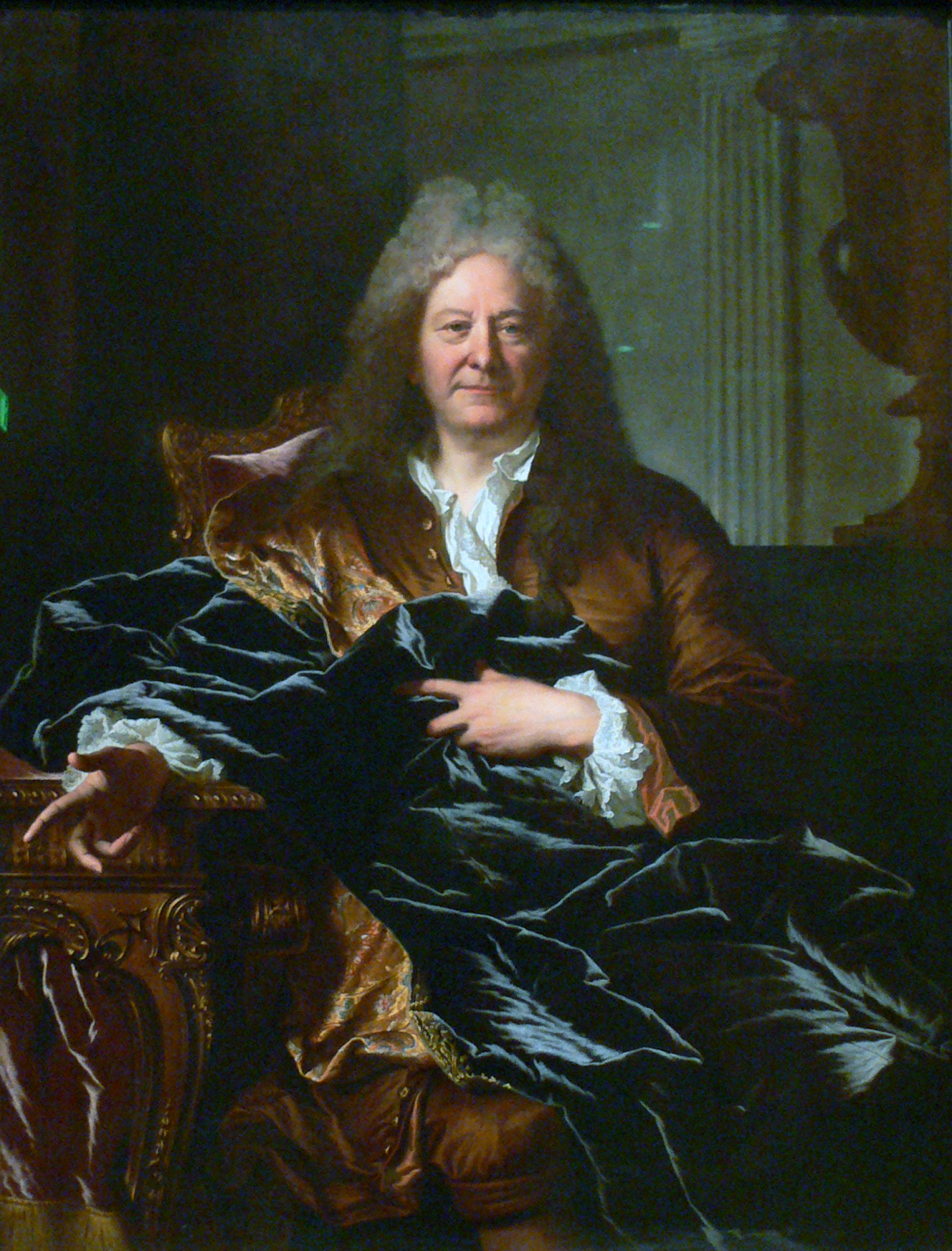 Hyacinthe Rigaud - Antoine Pâris, oil on canvas, 1724. Pasadena (CA, USA), Norton Simon Museum, F.1965.1054.P